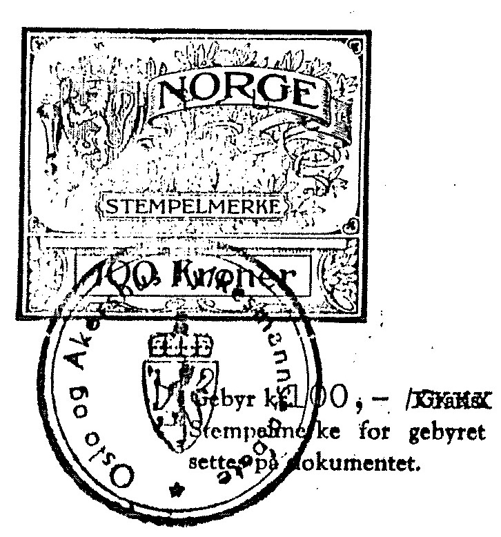 Stempelmerke fra offentlig norsk dokument fra 1967